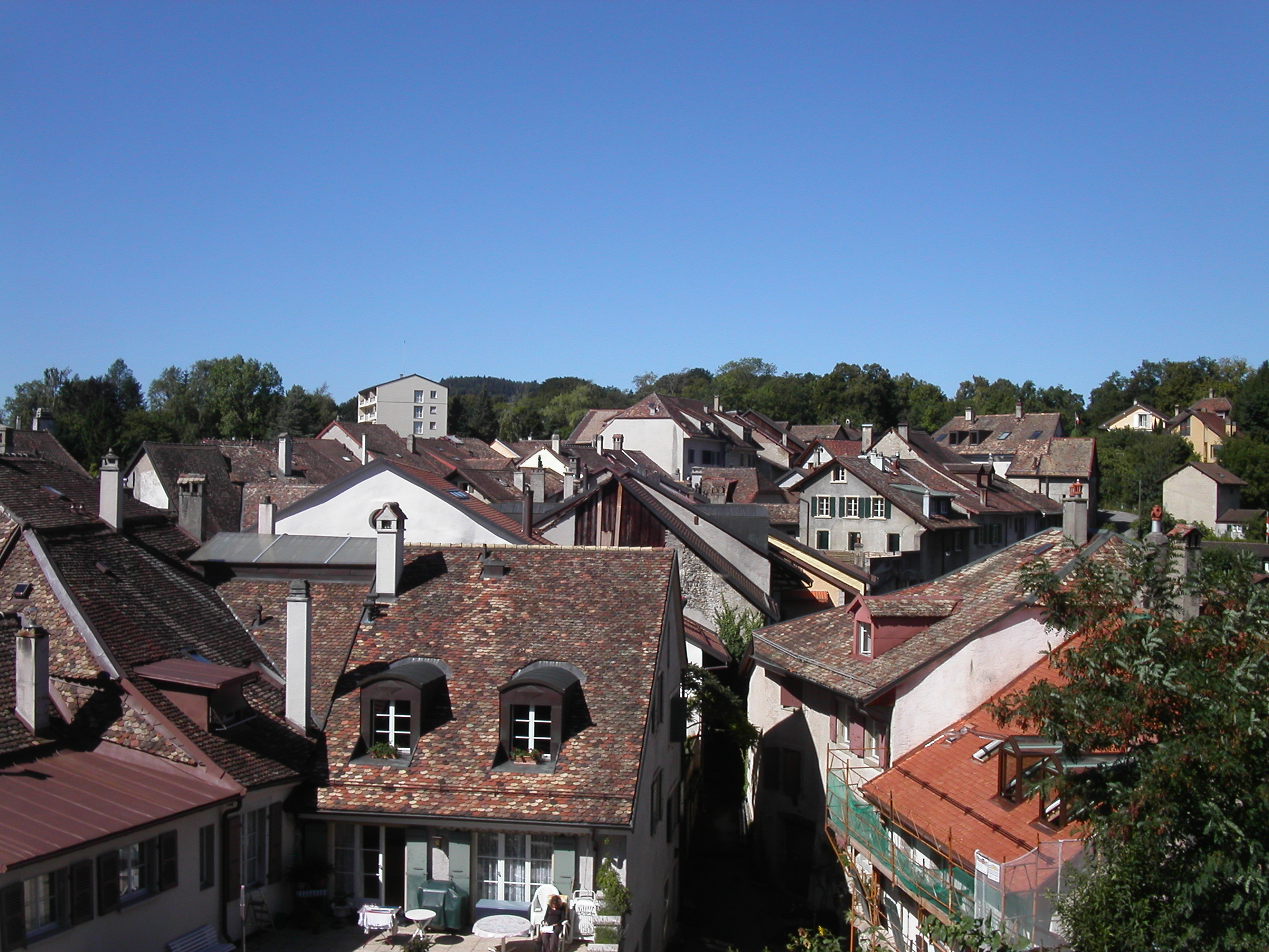 Vue du village d'Aubonne, canton de Vaud, Suisse.